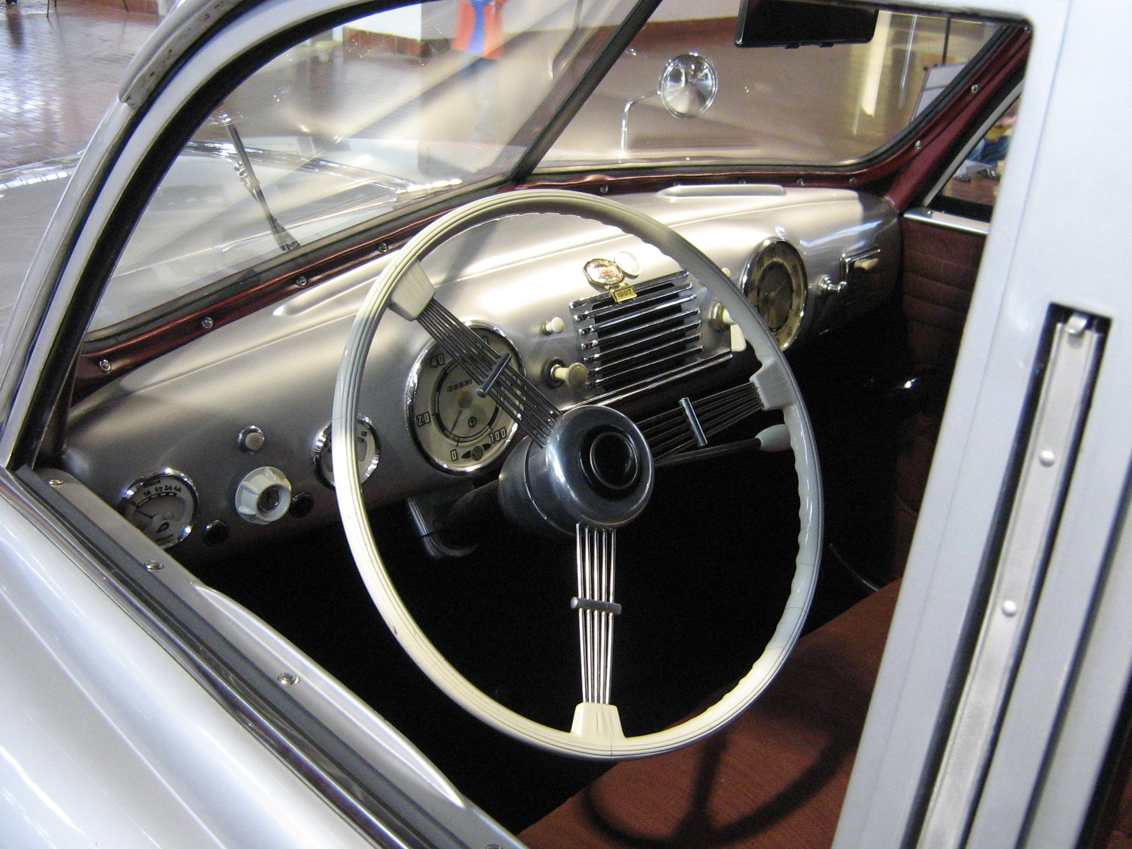 1950 Tatra T-600